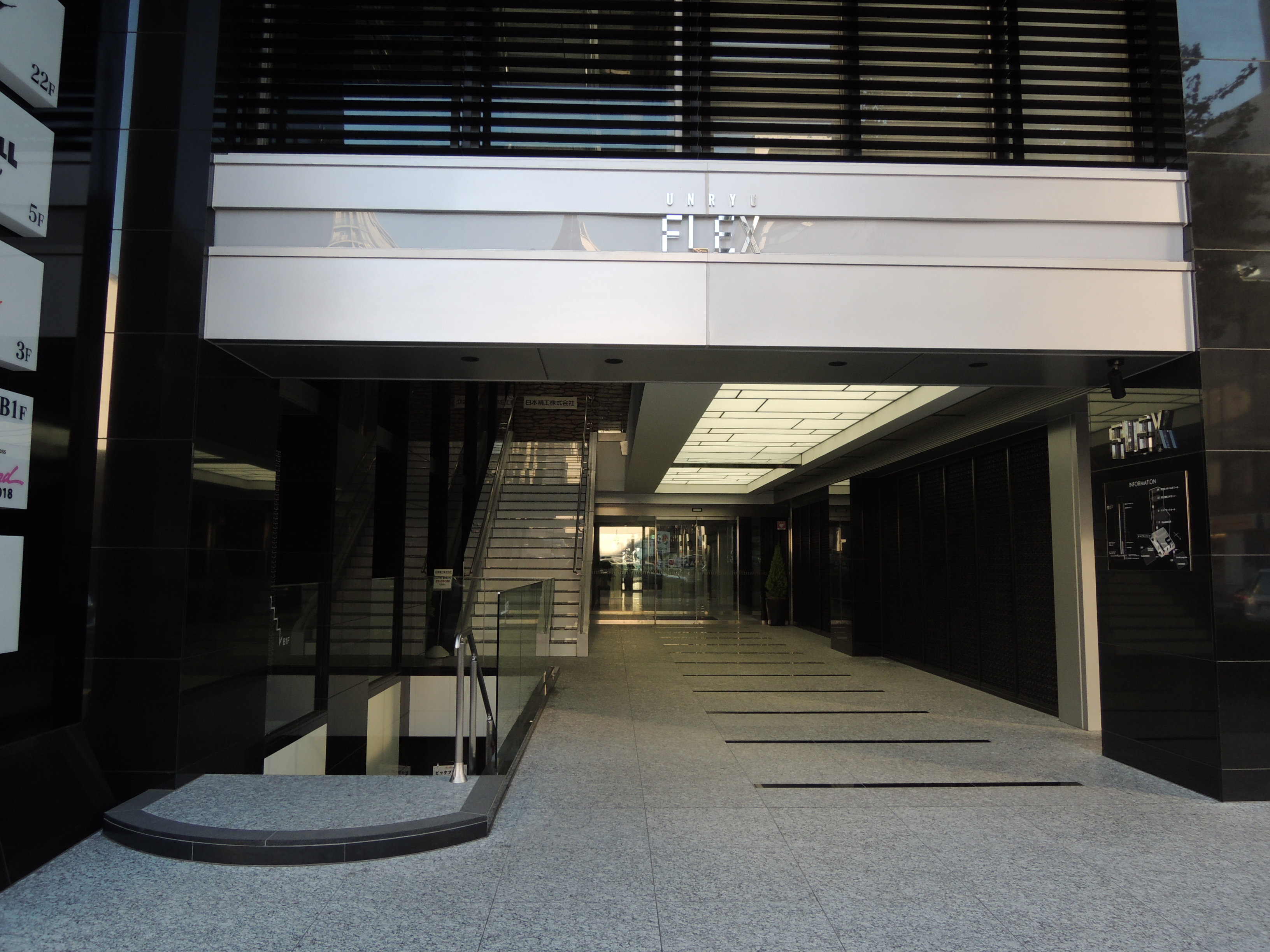 雲竜フレックスビル 西館 入り口。 地下は ライブハウス Heartland。